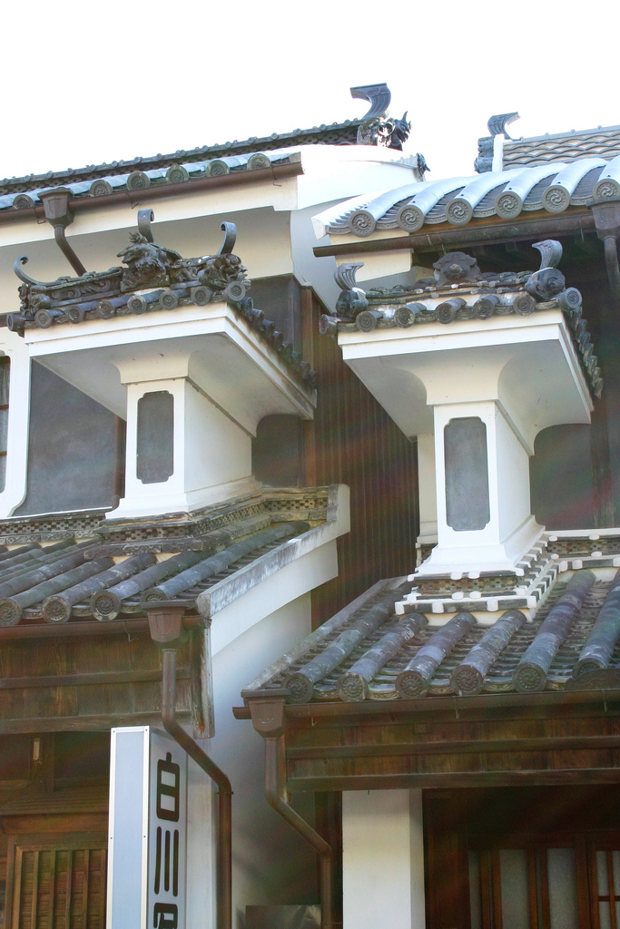 These are the typical Udatsu as can be found in Udatsu-no-Machinami, Mima City, Tokushima, Japan